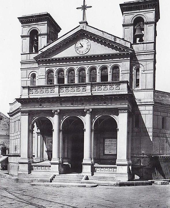 Chiesa di San Vitale dopo il restauro della facciata del 1898 su progetto di Nicola Breglia. Il restauro terminerà nel 1900. La chiesa verrà distrutta nel 1939 per fare spazio alla nuova chiesa su piazza del Littorio (l'odierna piazza Italia).